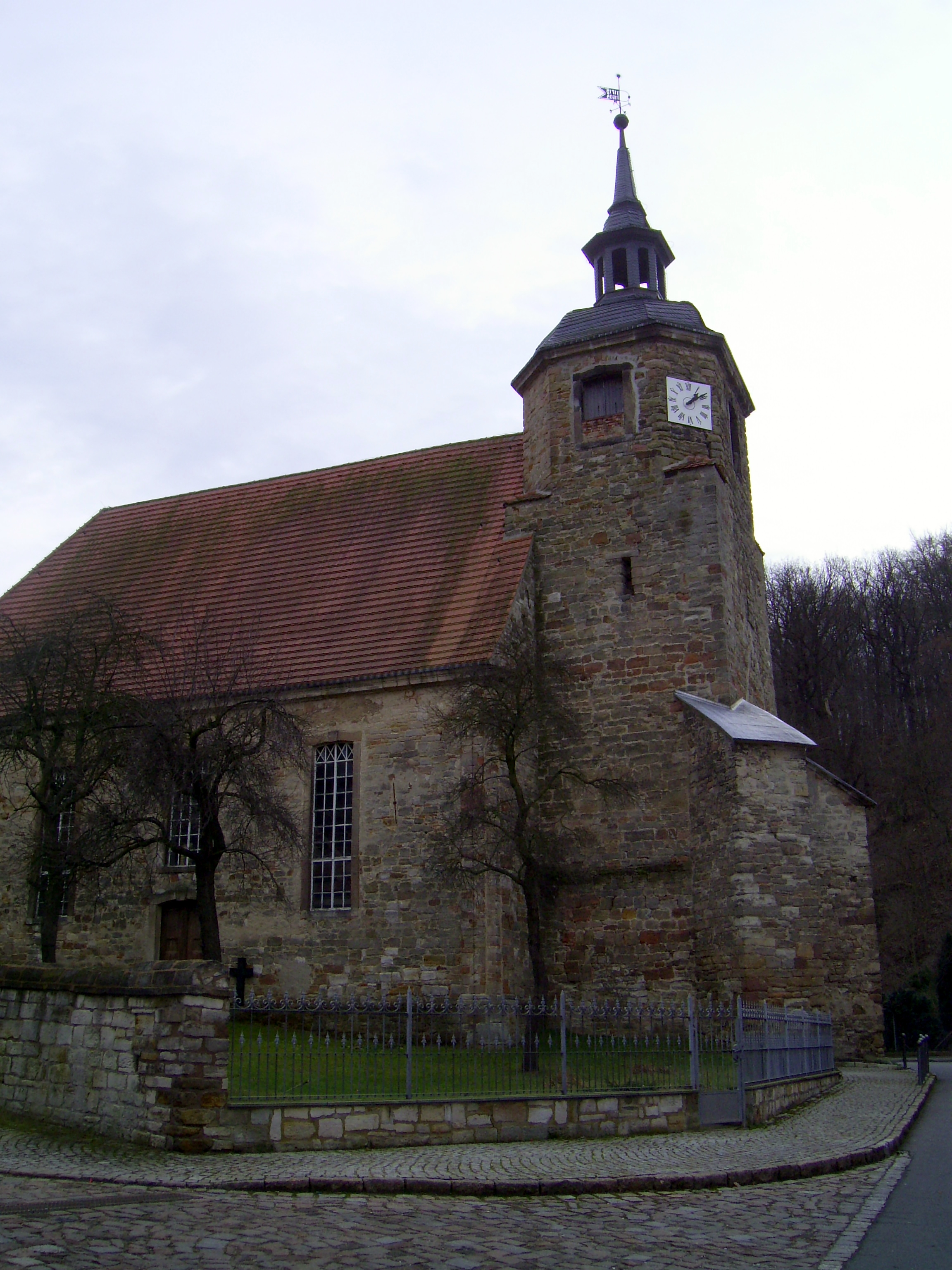 Barockkirche in Leißling, Burgenlandkreis, Sachsen-Anhalt, Deutschland